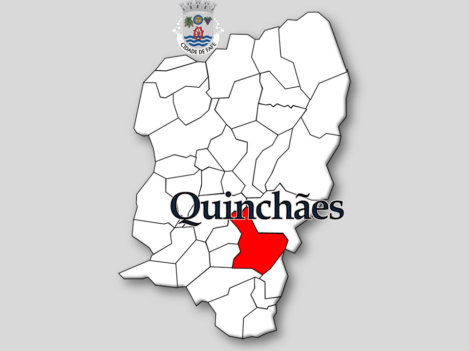 Censos 1864/2011